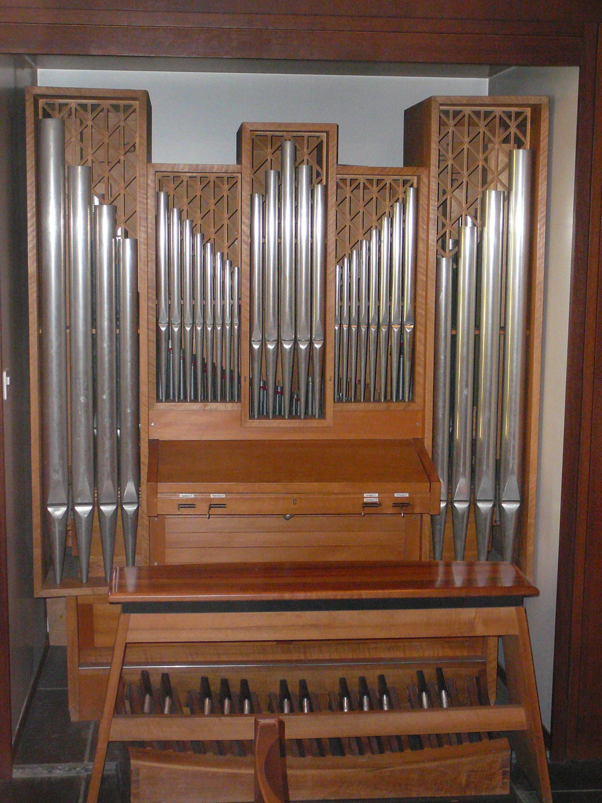 Römisch-katholische Pfarrkirche St. Mauritius Oberengstringen, Orgel in der Kapelle